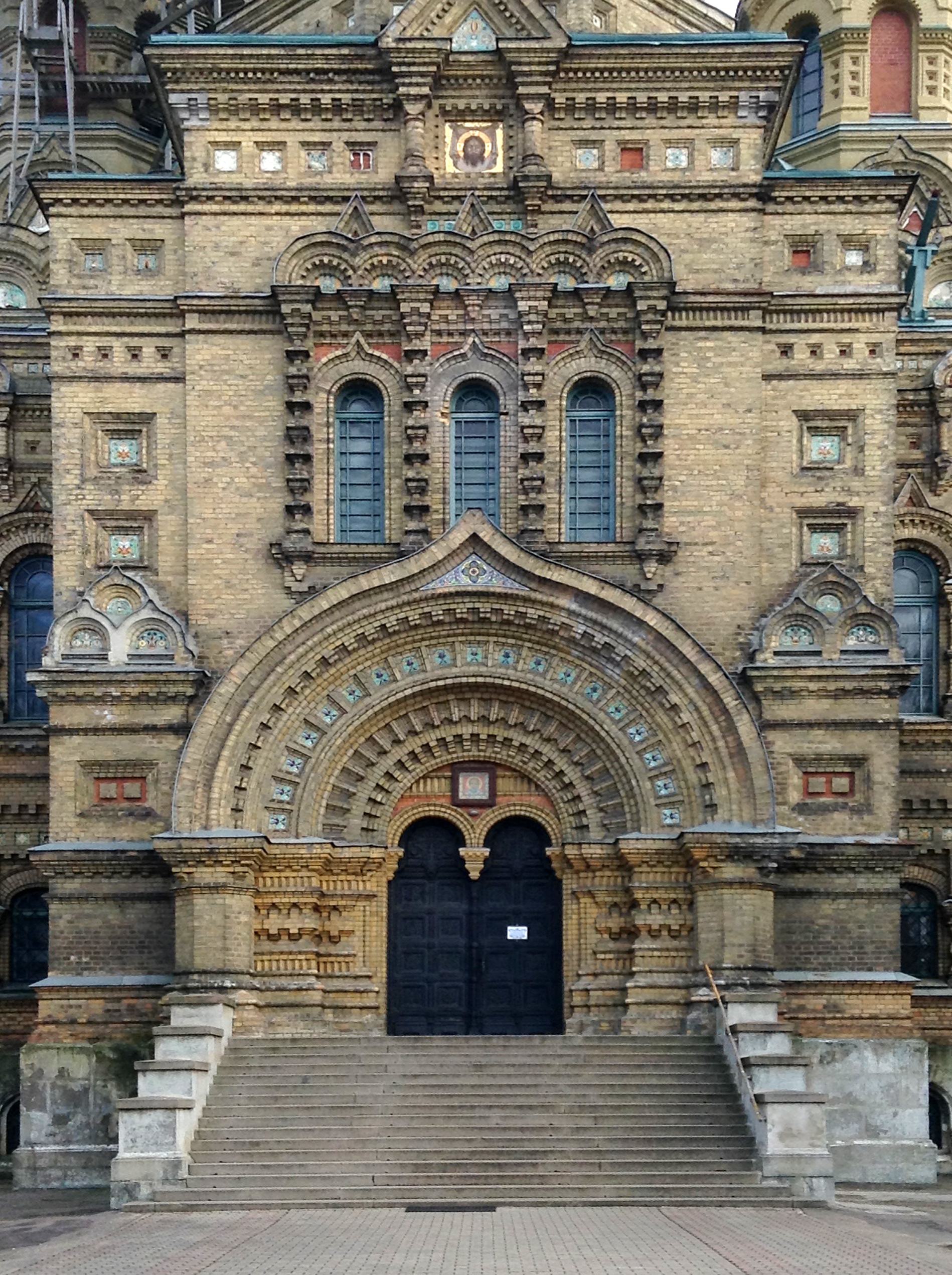 Liepājas Sv. Nikolaja pareizticīgo Jūras katedrāle, Liepāja, Katedrāles iela 2